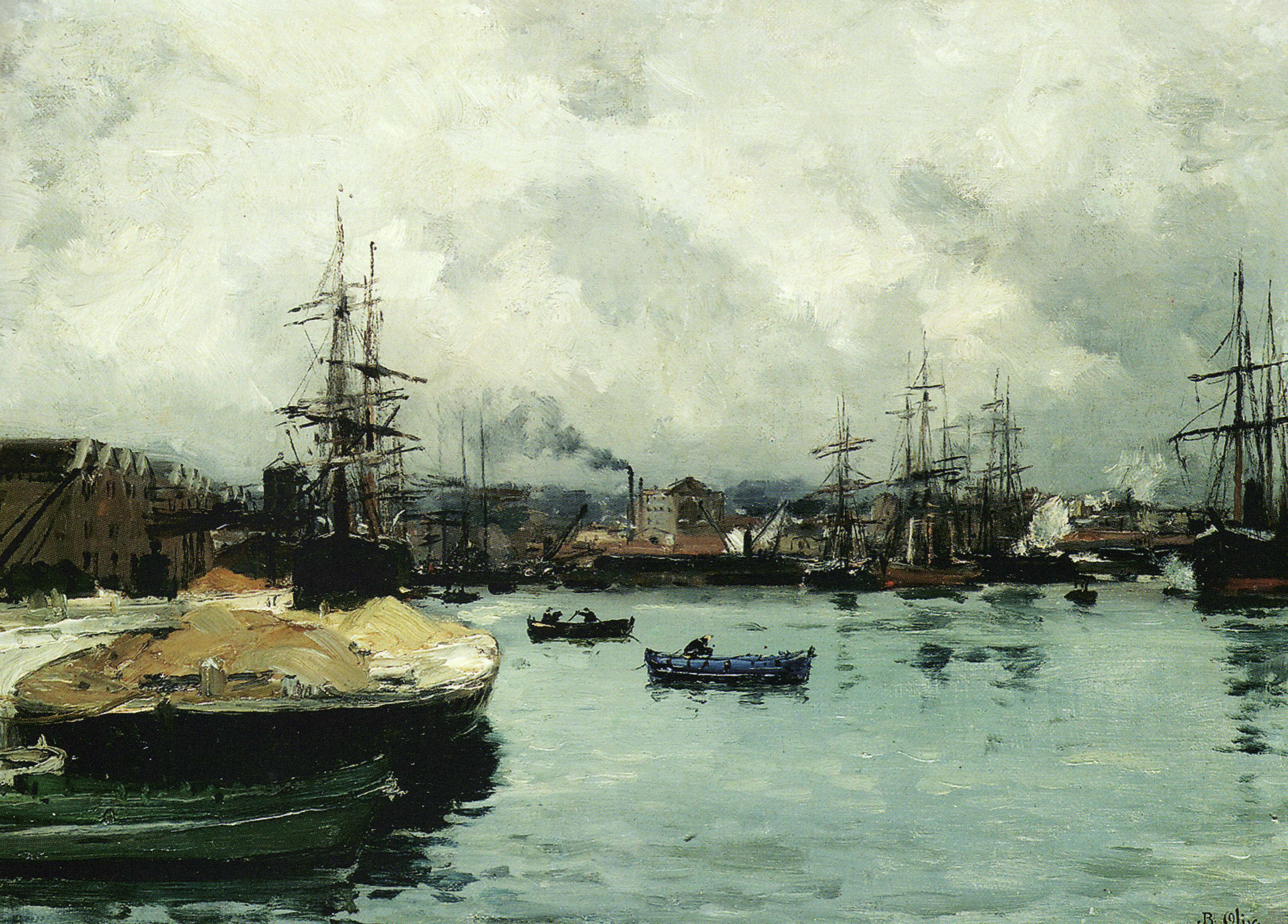 Le port de commerce. Huile sur toile.